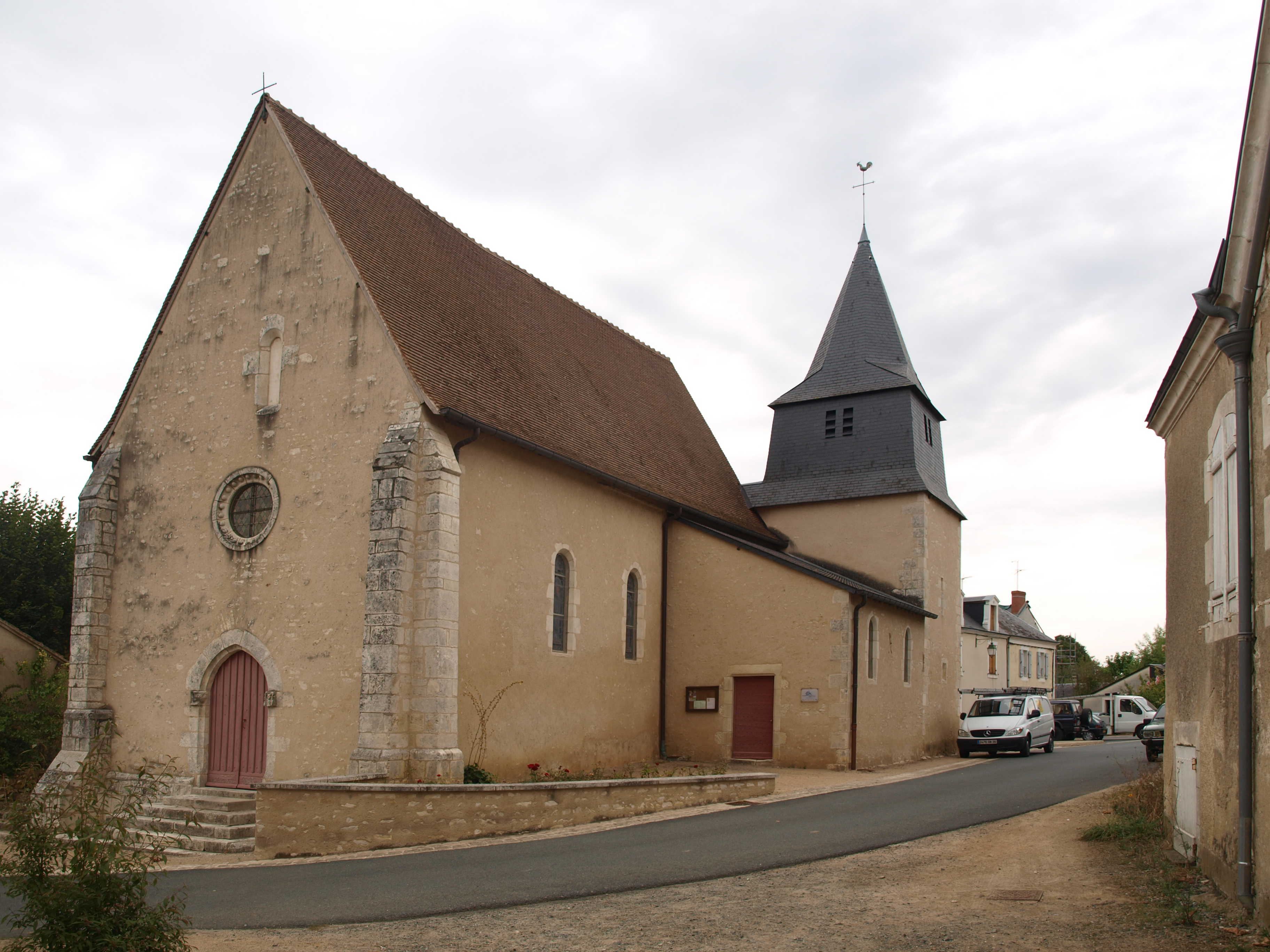 Arthon (Indre; France) ; église vue d'arrière